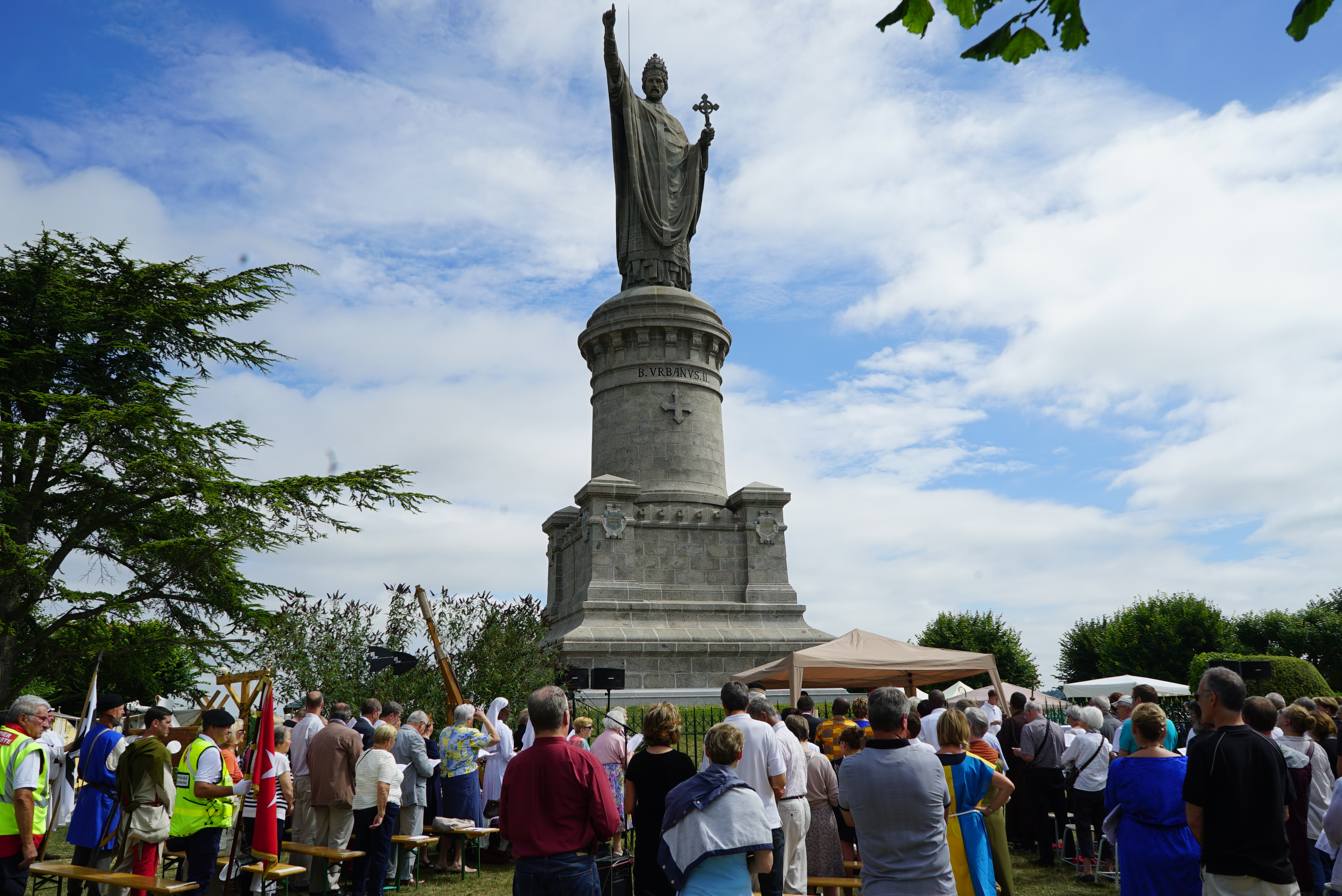 à Châtillon.